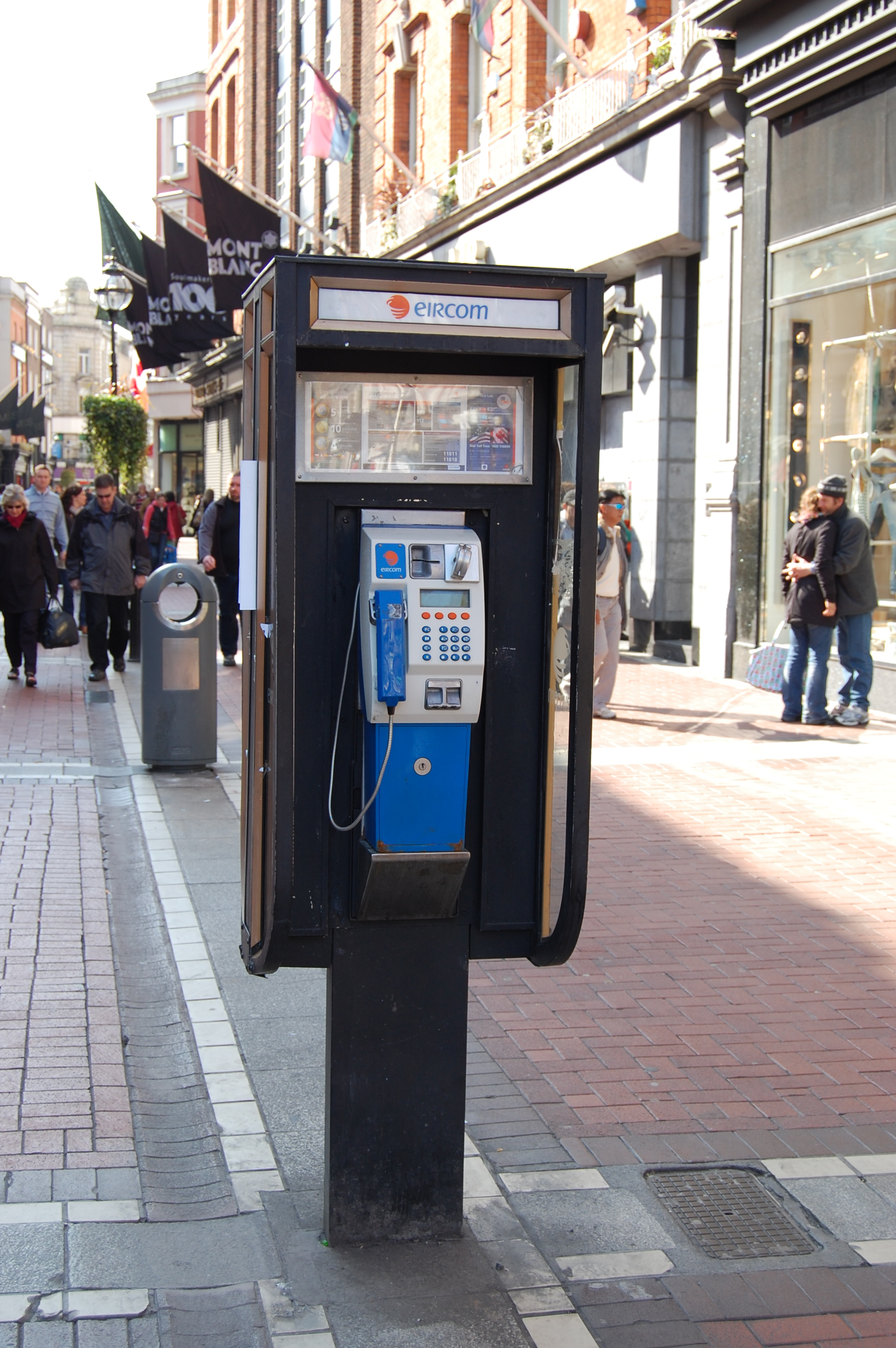 Uma cabina telefônica em Dublin, Irlanda.